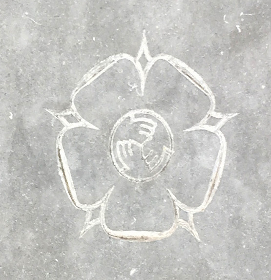 Een symbool dat op een aantal zerken op het kerkhof van het kerkje van Spaarnwoude te vinden is